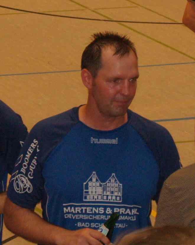 Anders Bäckegren, ein ehemaliger schwedischer Handballspieler